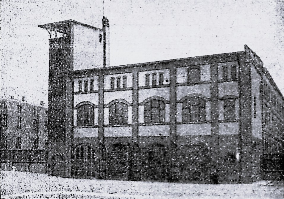 Remise und Turnsaal nebst Steiger-Turm der neuen St. Lorenz-Feuerwache